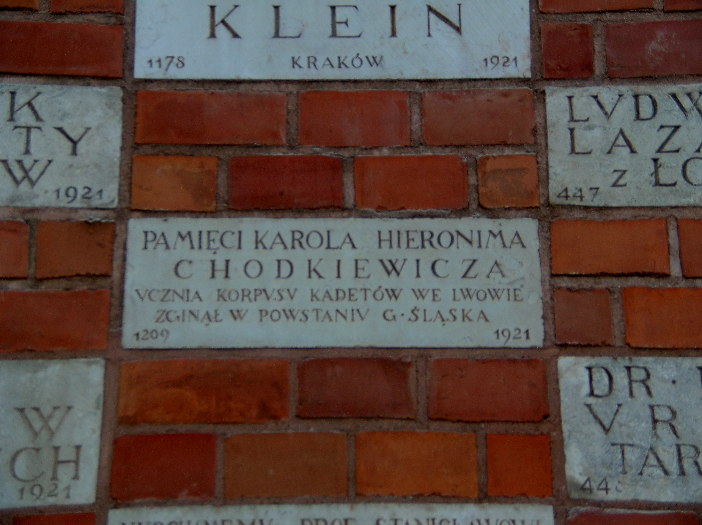 Tablica upamiętniająca poległego w Powstaniu Śląskim Karola Hieronima Chodkiewicza na ścianie Wawelu.